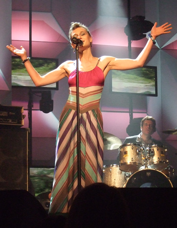 Valerie (singer)